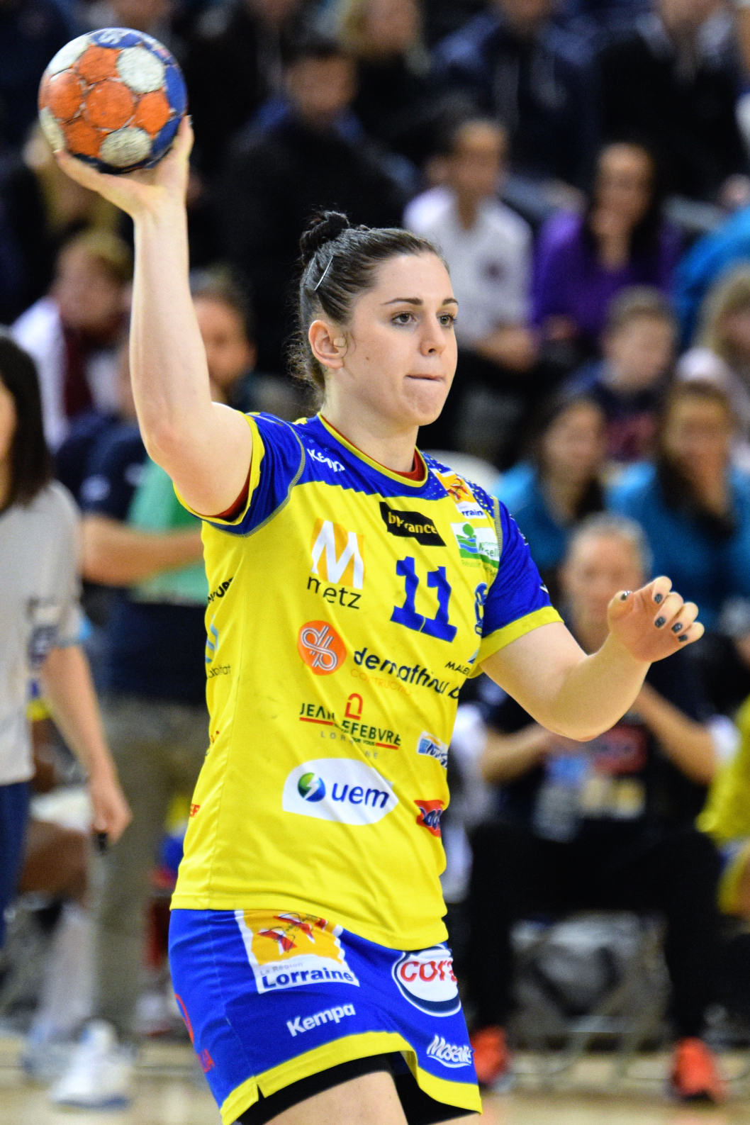 Tamara Horacek , le 31 janvier 2016 lors du match Issy Paris Hand / Metz Handball pour le compte de la 14e journée. Au stade Robert Carpentier à Issy-les-moulineaux.